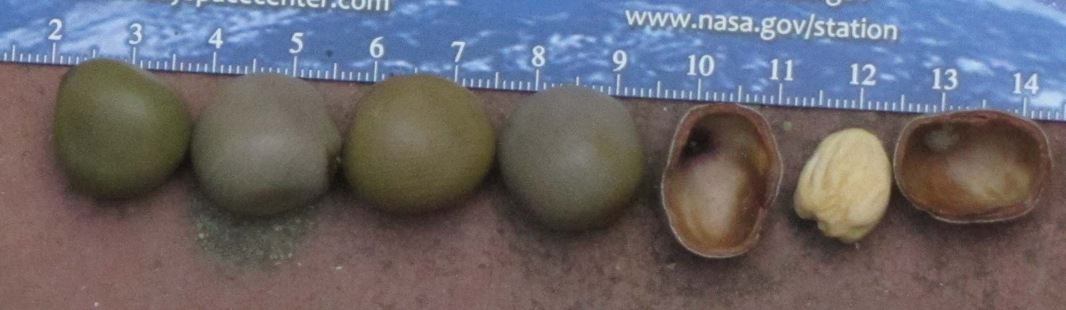 கழிச்சிக்கொட்டை என்று கூறப்படும் இதனைத் தெல்லுக்காய் என்றும், சூட்டுக்கொட்டை என்றும் வழங்குவர். சிறுவர் இதனைக் கோலிக்குண்டு போல் பயன்படுத்தி விளையாடுவர்.